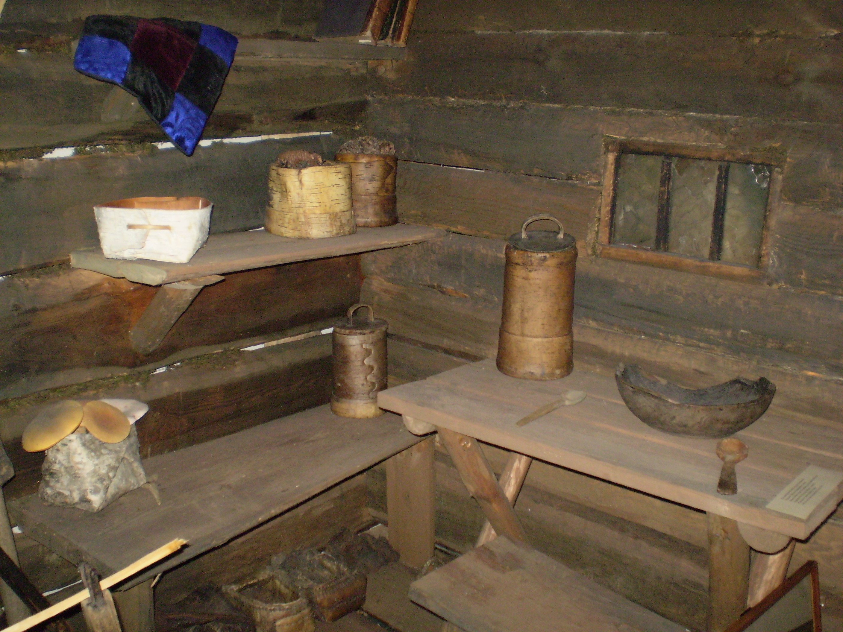 Вещи Лыковых. Красноярский литературный музей.